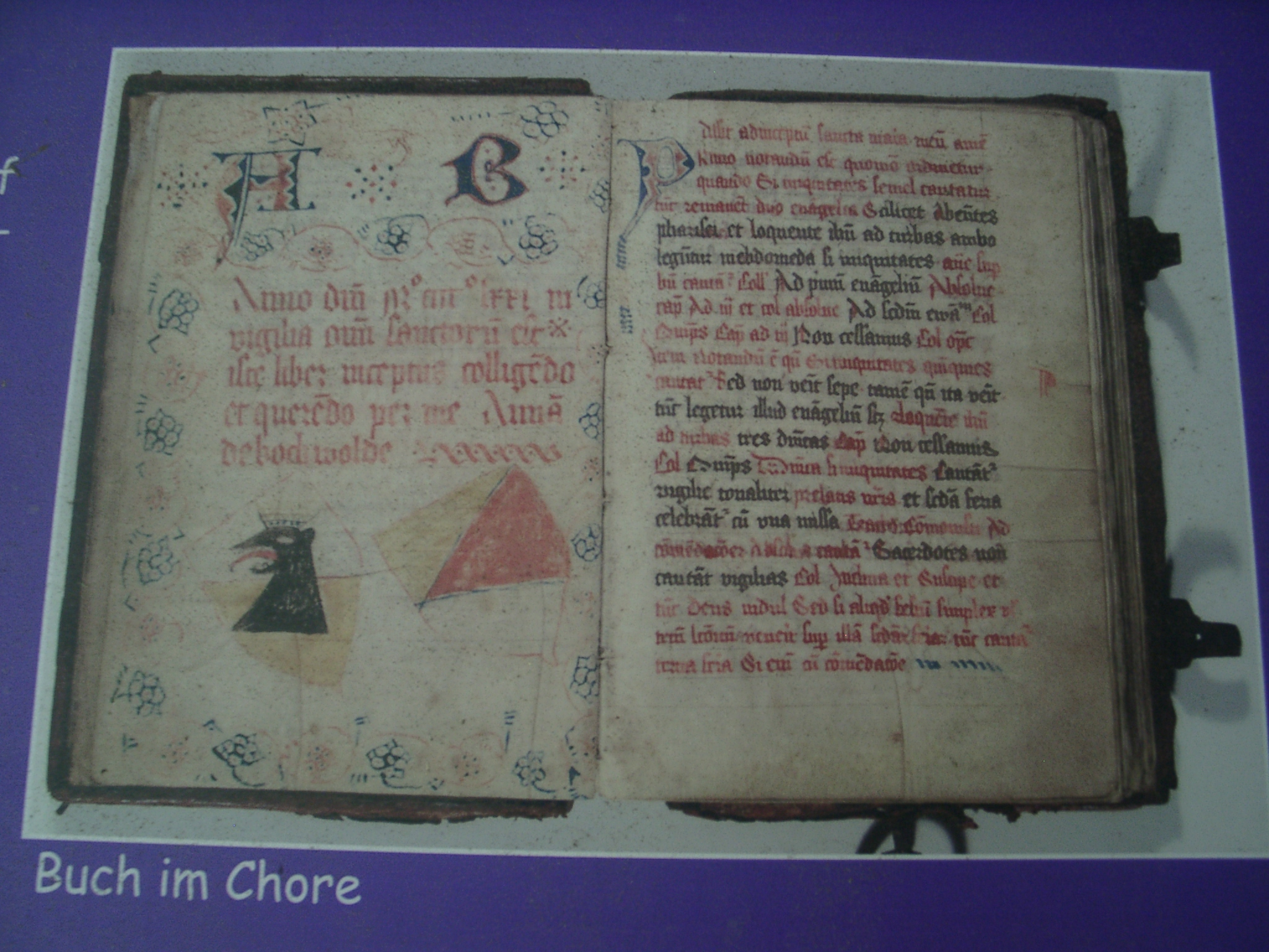 Buch im Chore, Preetz (Foto einer Hinweistafel)